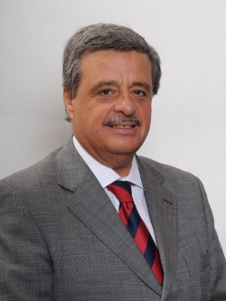 Sergio Aguiló, político chileno.